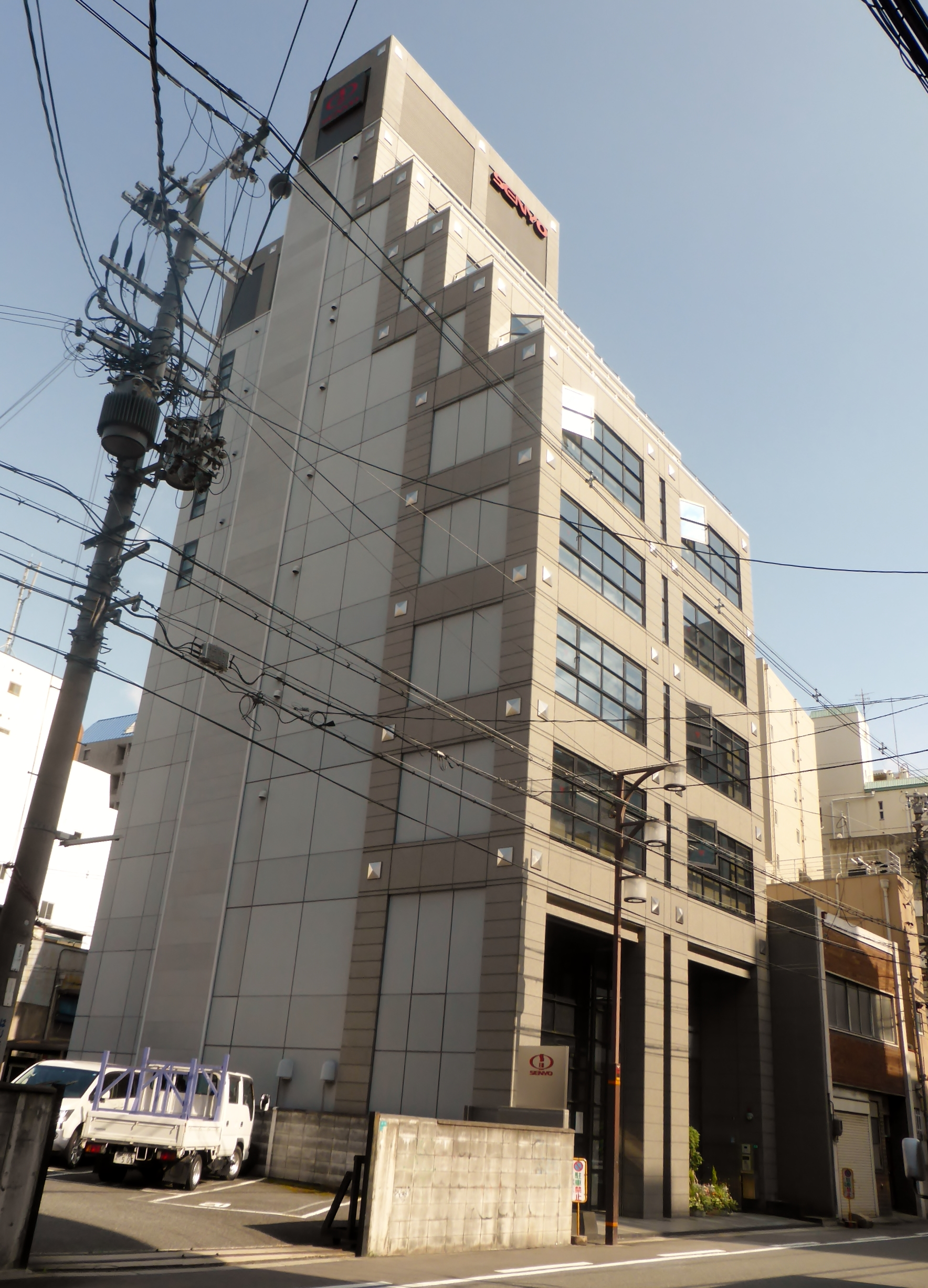 泉陽ビルを撮影